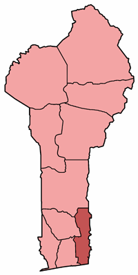 Mappa della diocesi di Porto Novo, nel Bénin. Lavoro personale, eseguito a partire da questa immagine di Commons. Fonte per i confini delle diocesi: Guida delle missioni cattoliche 2005, a cura della Congregatio pro gentium evangelizatione, Roma, Urbaniana University Press, 2005. Categoria:Chiesa cattolica in Benin